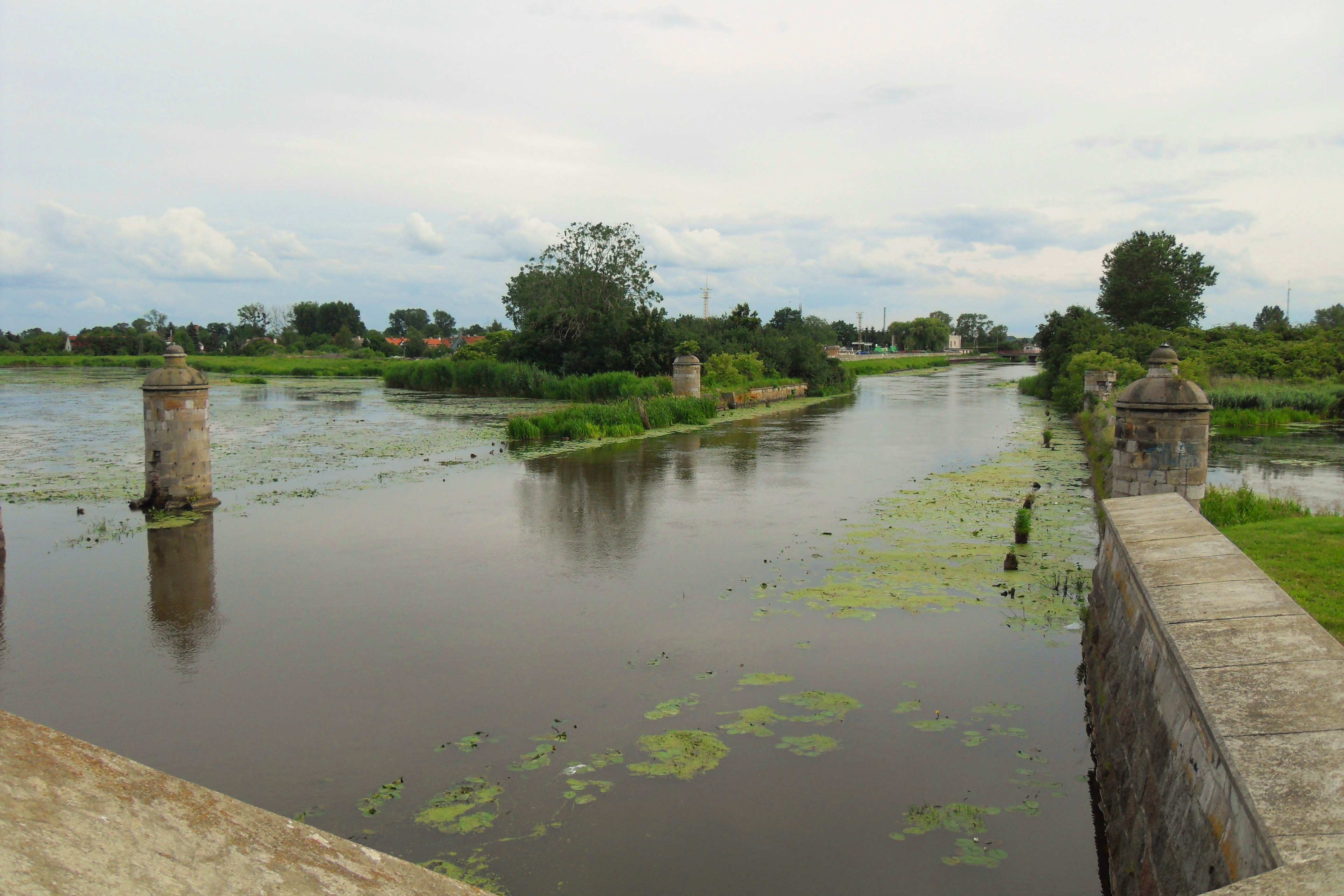 Gdańsk. Cztery Dziewice Śluzy Kamiennej.